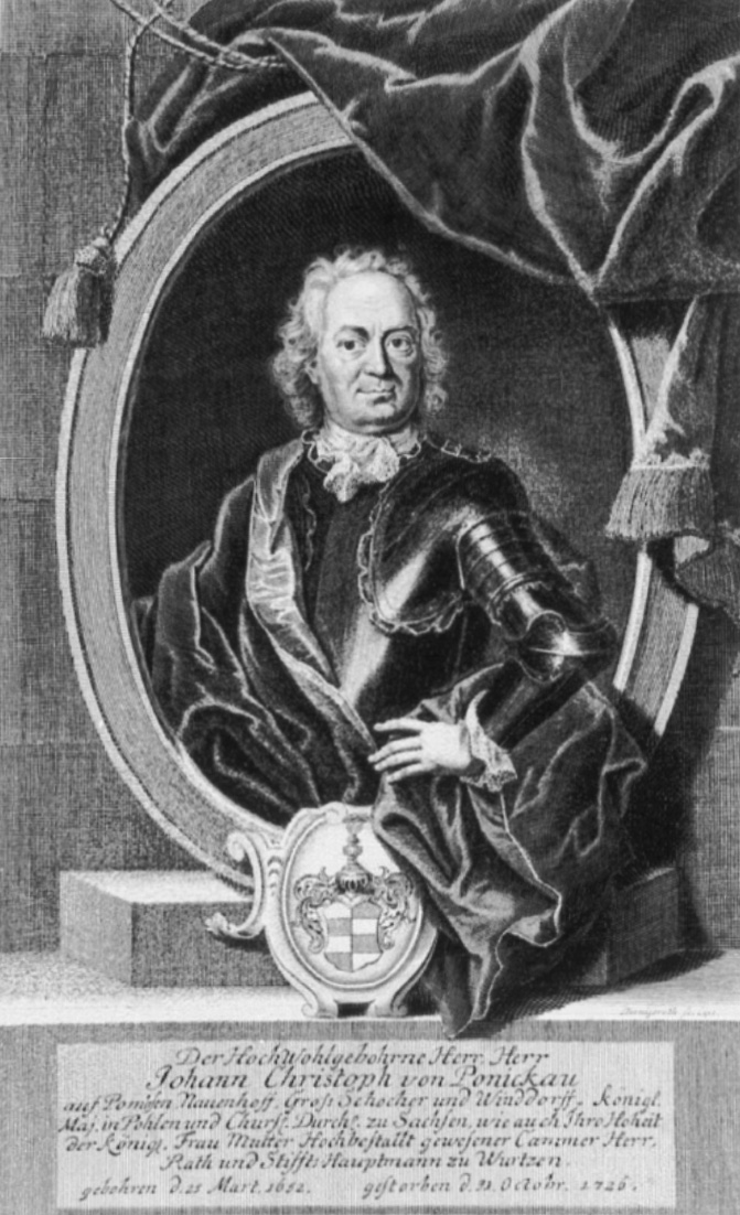 Portrait of Johann Christoph von Ponickau (1652-1726)